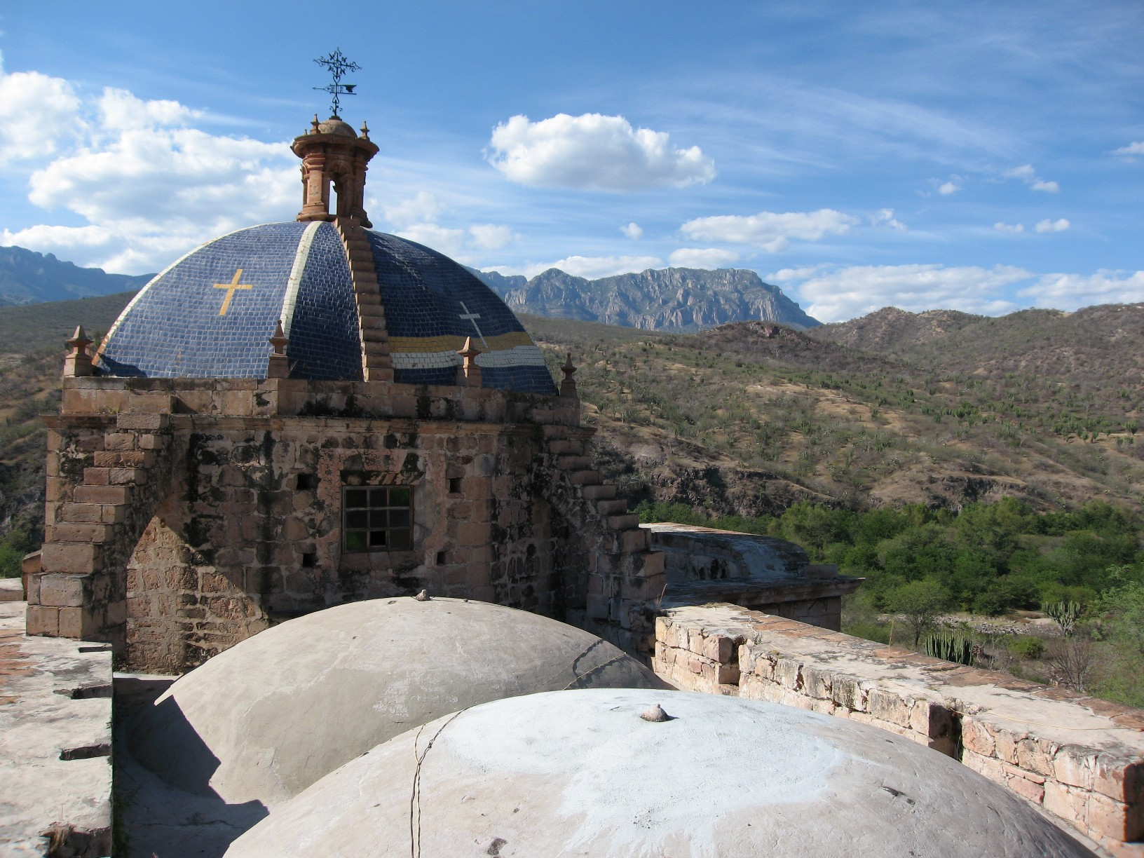 Panorama del techo de la catedral de La Playa, Bolanos, Jalisco